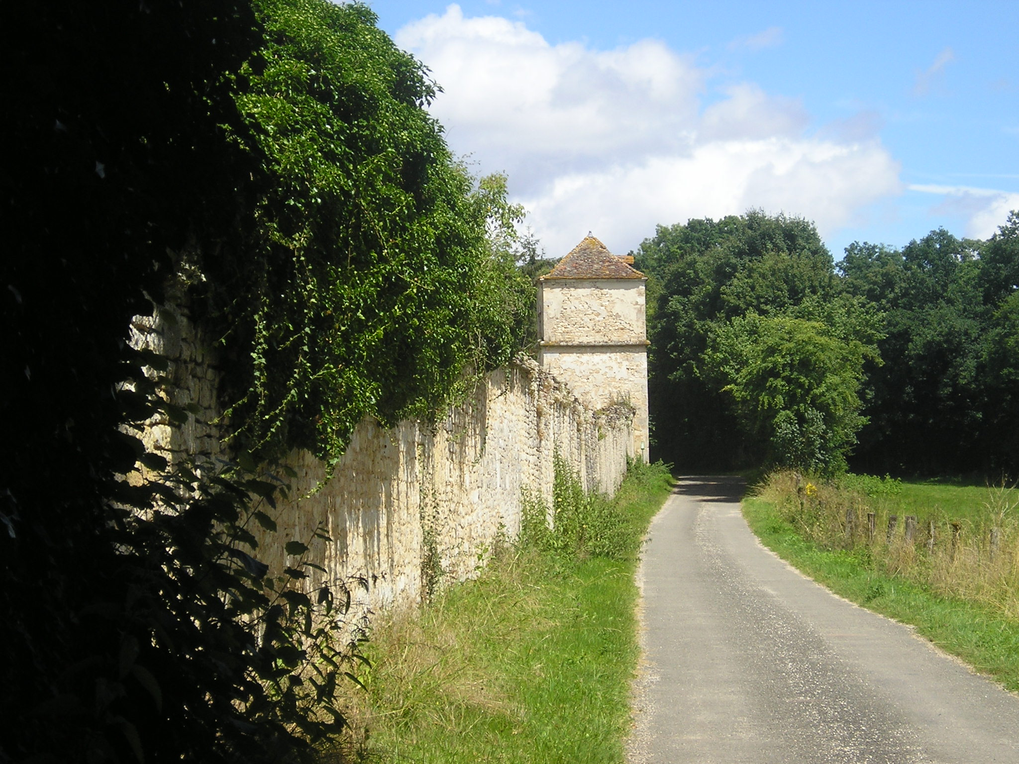 Vue du colombier de l'abbaye de la Crête, Haute-marne (France)